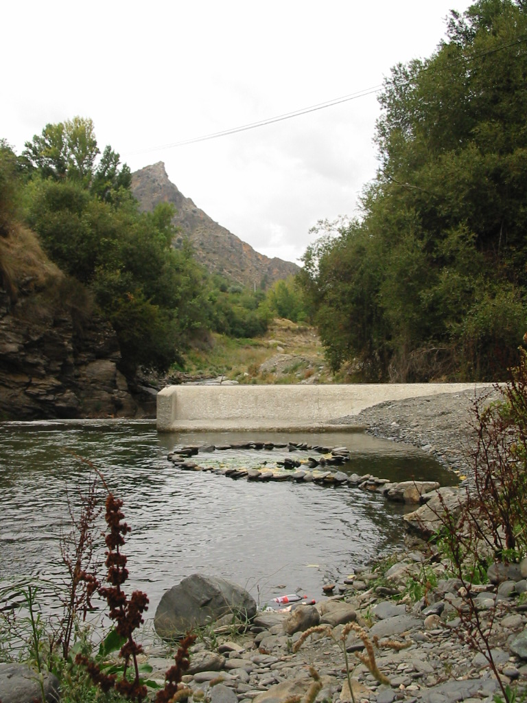 Proyecto e Land Art creado para la clase de Proyectos IV con Eduardo Martín Martin